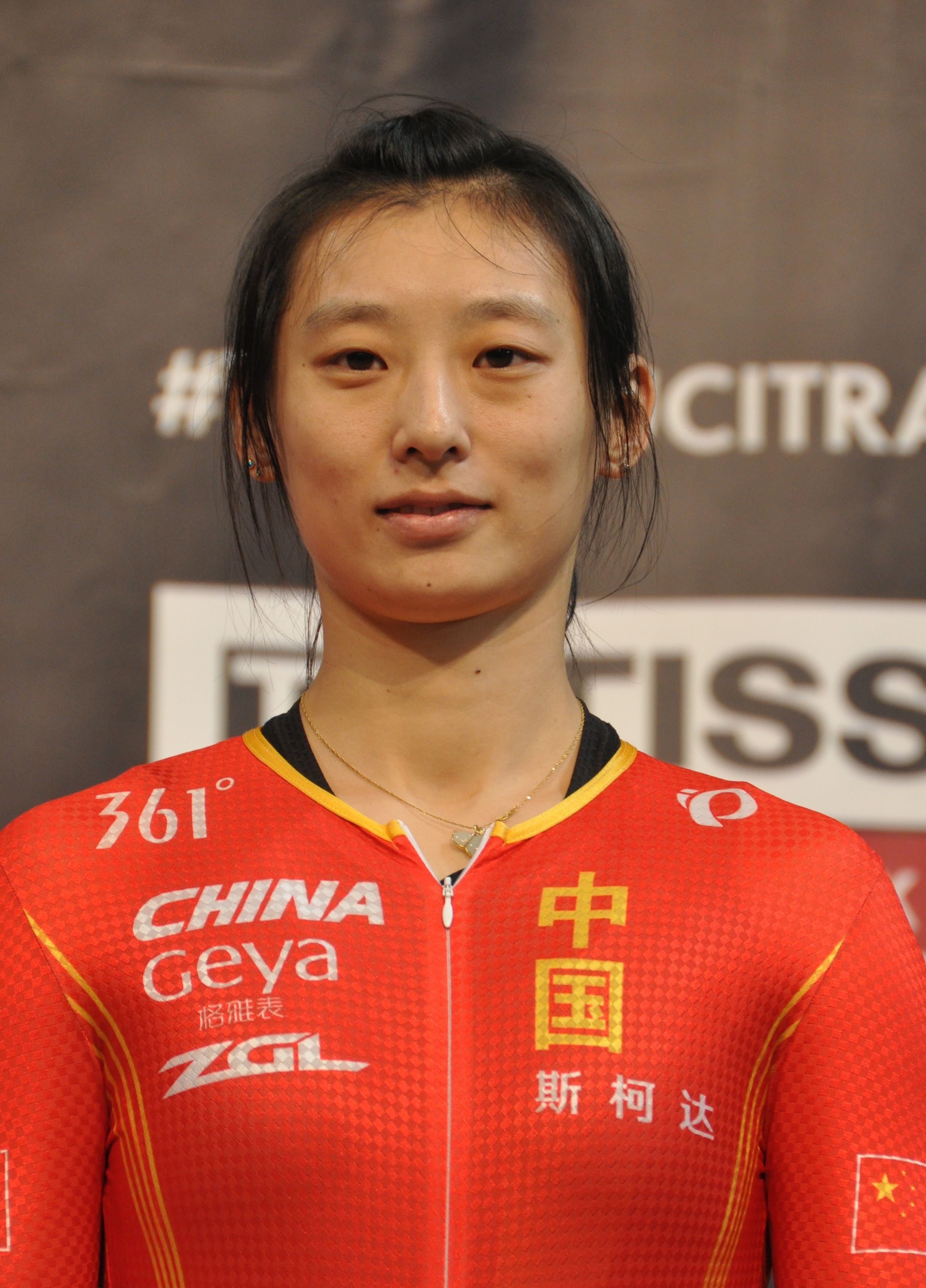 Han Jun, chinesische Radsportlerin